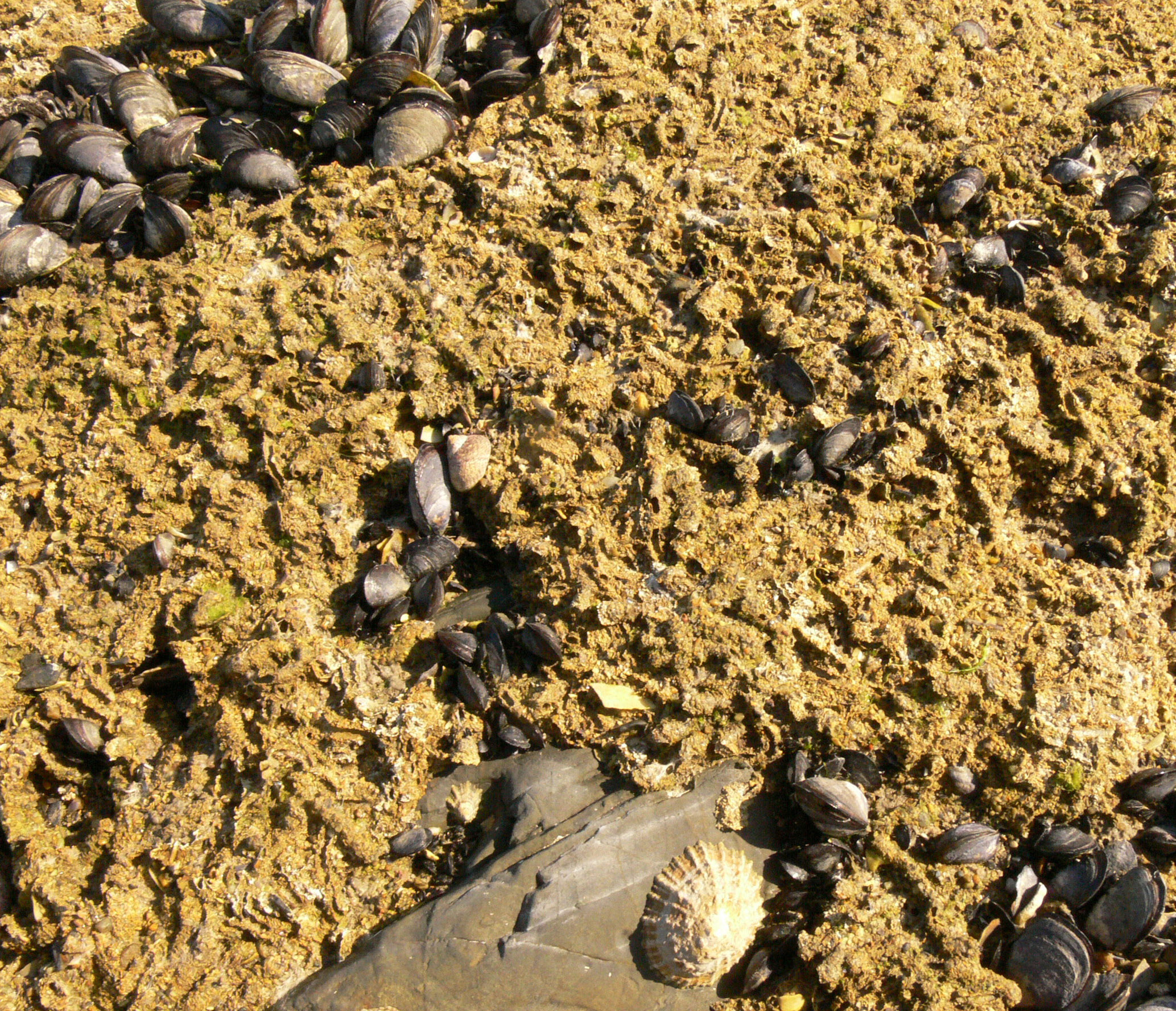 Les moules peuvent former des tapis denses et de petits récifs, mais dans les zones sableuses, elles ont aussi à faire face à la concurrence pour l'espace disponibles sur les surfaces dures, ici rapidement colonisés par des organismes encroutants. Lieu : Finistère, au nord du Cap de la Chèvre (Bretagne, Ouest de la France, Europe). Juillet 2006